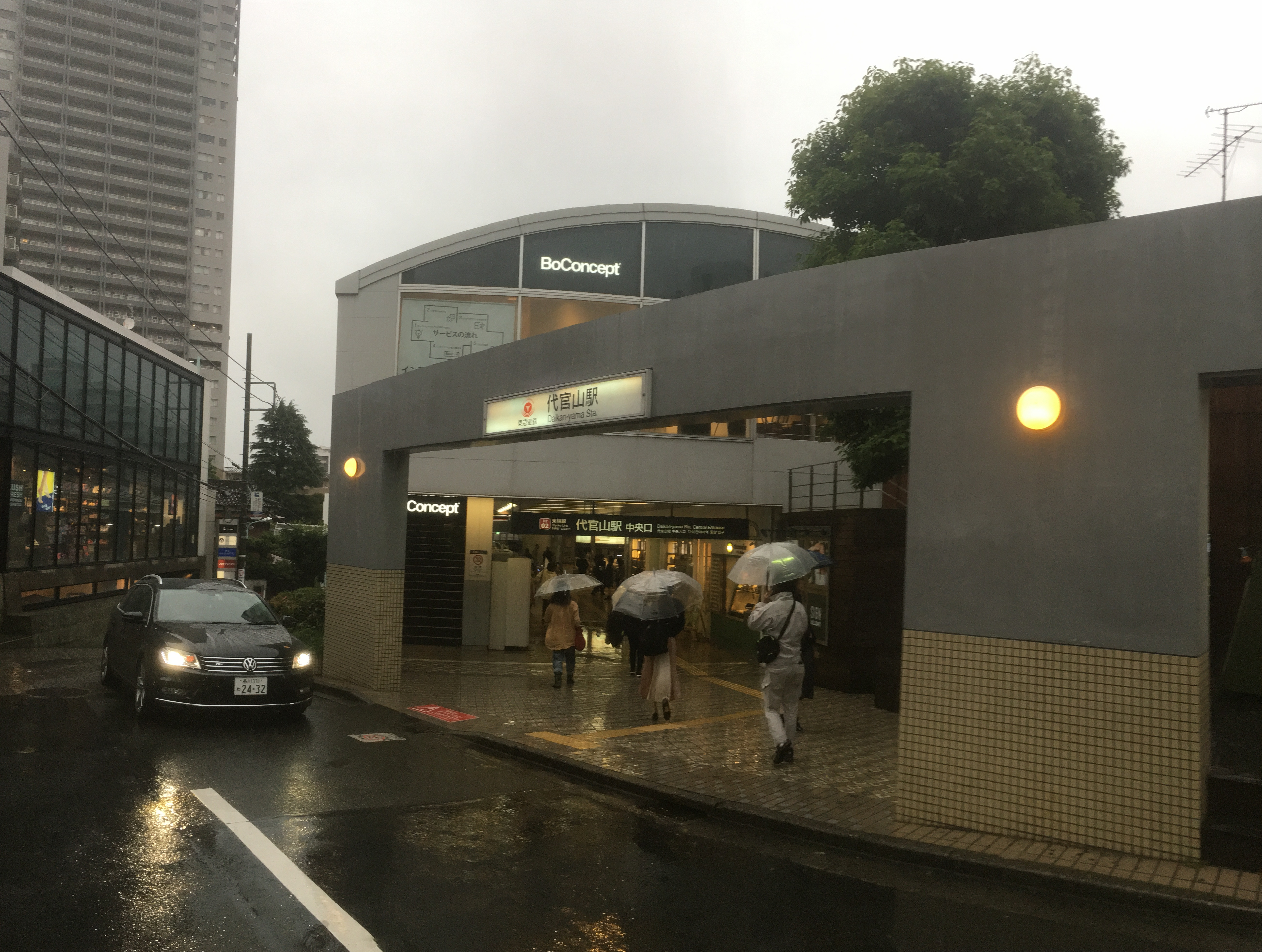 代官山駅の中央口 (Daikanyama Station central exit)